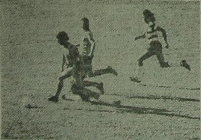 Partido del 23 de noviembre de 1975, Unión de Santa Fe 0-Rosario Central 1. El delantero de Central Oscar Lamberti elude al arquero José Luis Burtovoy y luego convertirá el único gol del encuentro.